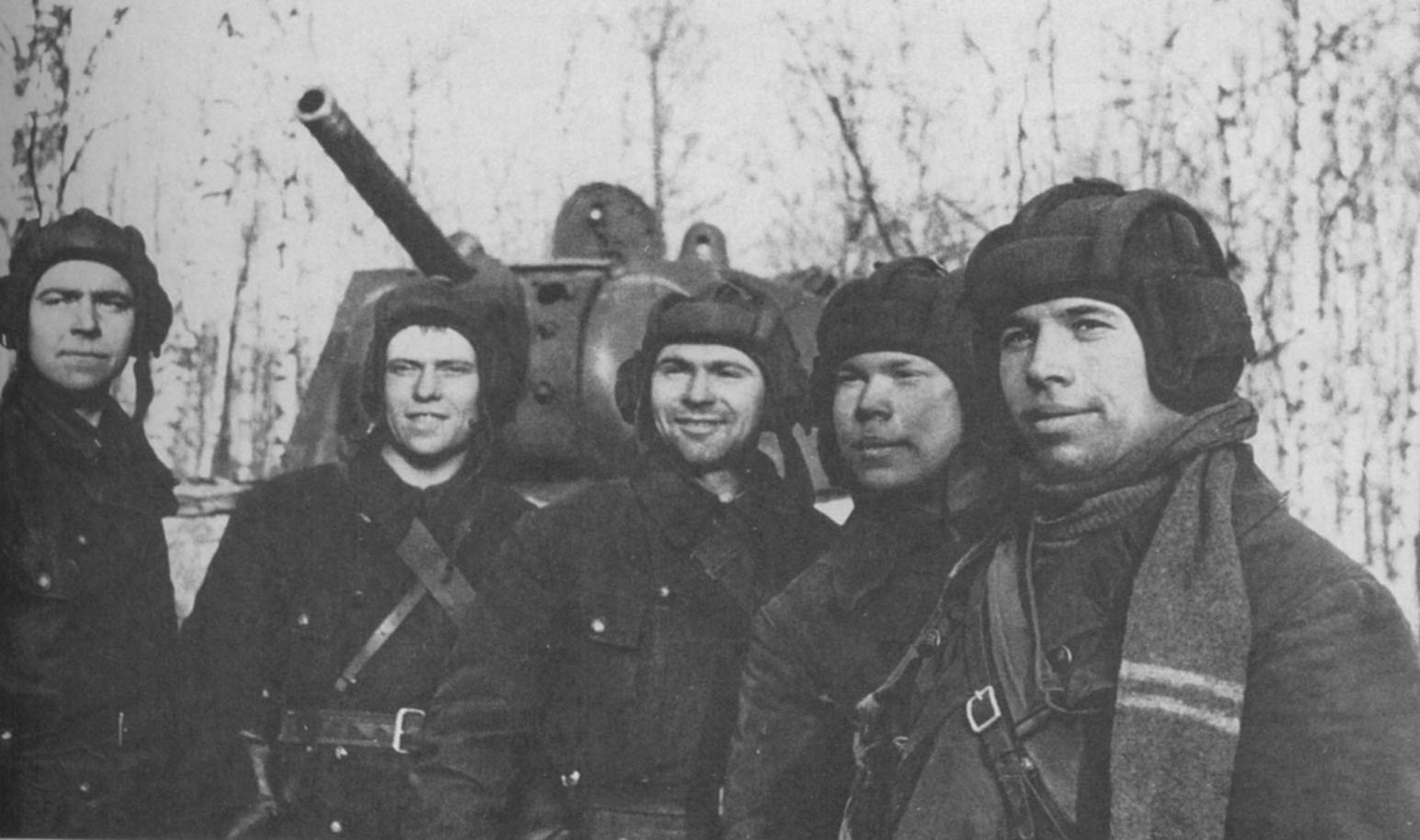 Экипаж тяжелого танка КВ-1 под командованием лейтенанта Н. Киндера (крайний справа) из 17-й танковой бригады у своей боевой машины. 2 декабря, через две недели после этого снимка весь экипаж погиб в бою.